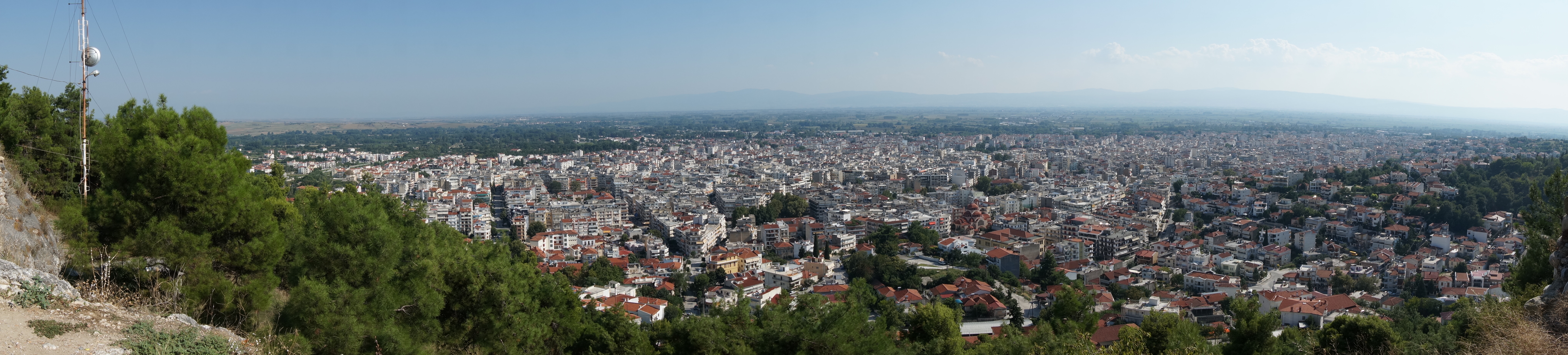 à Serres.